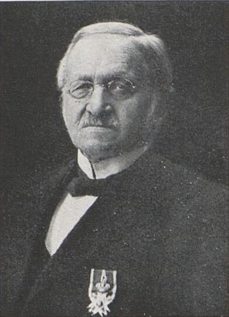 Nils Schøyen (1832-1916), lawyer, sorenskriver and mayor of Elverum